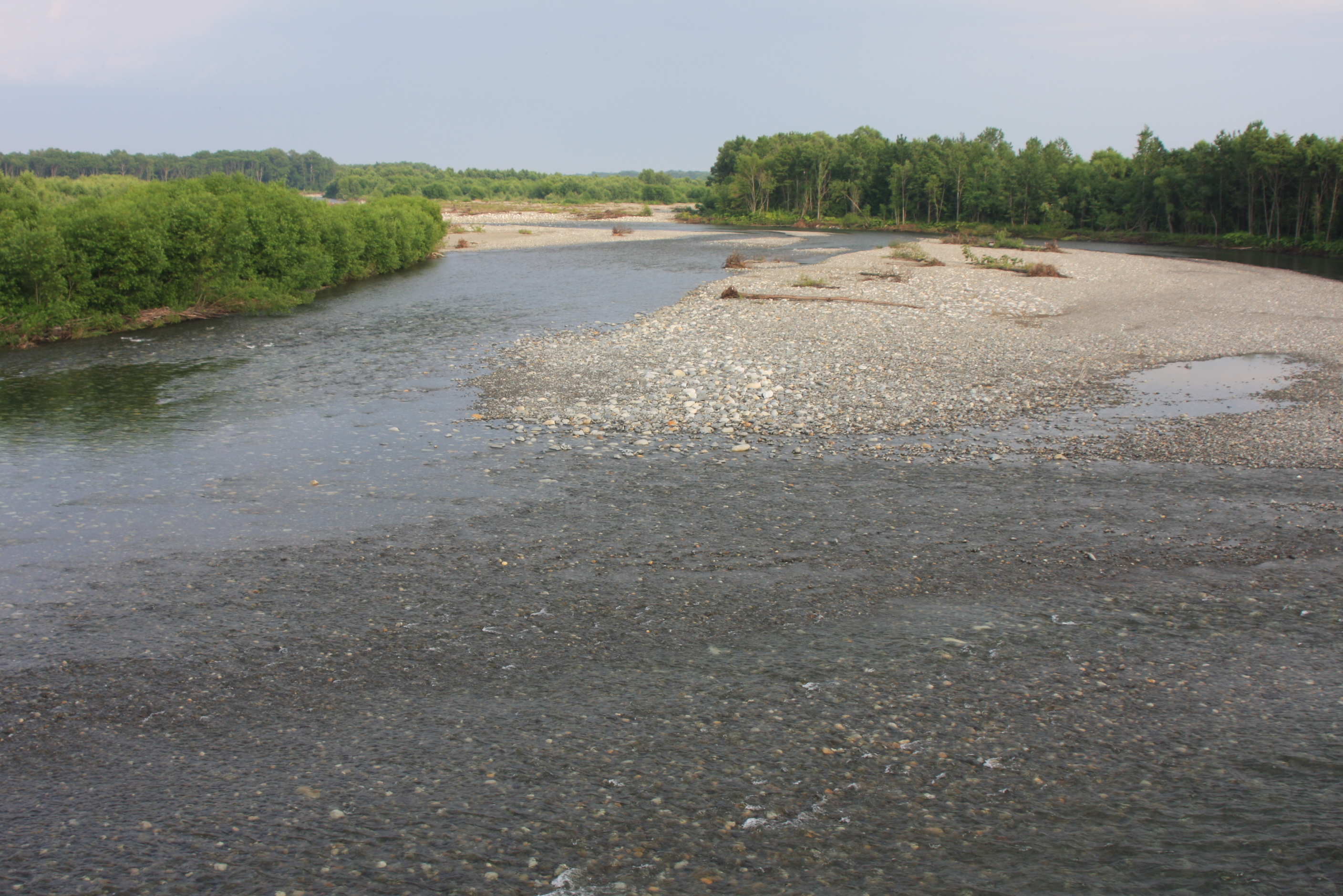 歴舟川 歴舟橋より下流とケショウヤナギの林を遠望